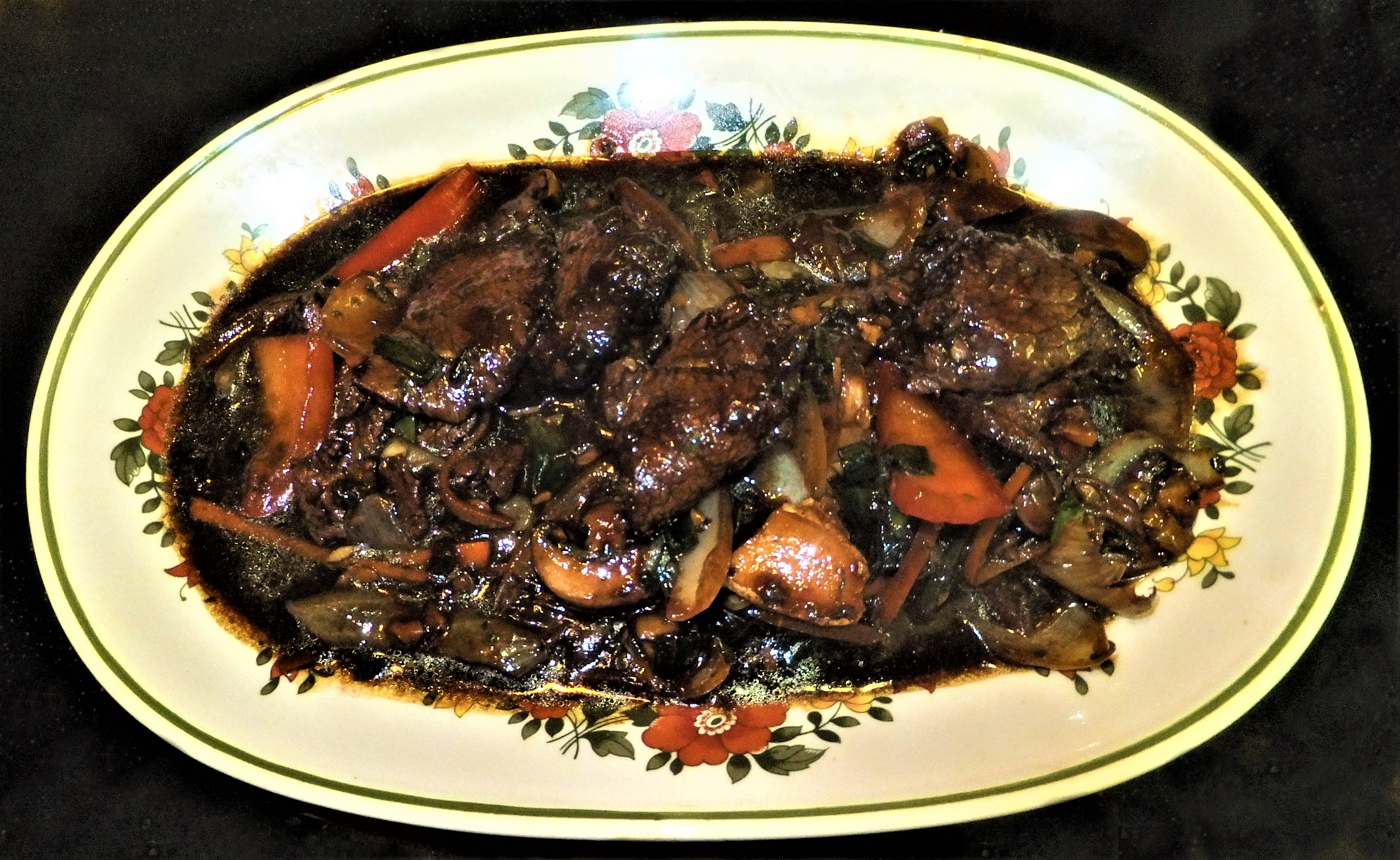 Rinderfilet mit Zwiebeln